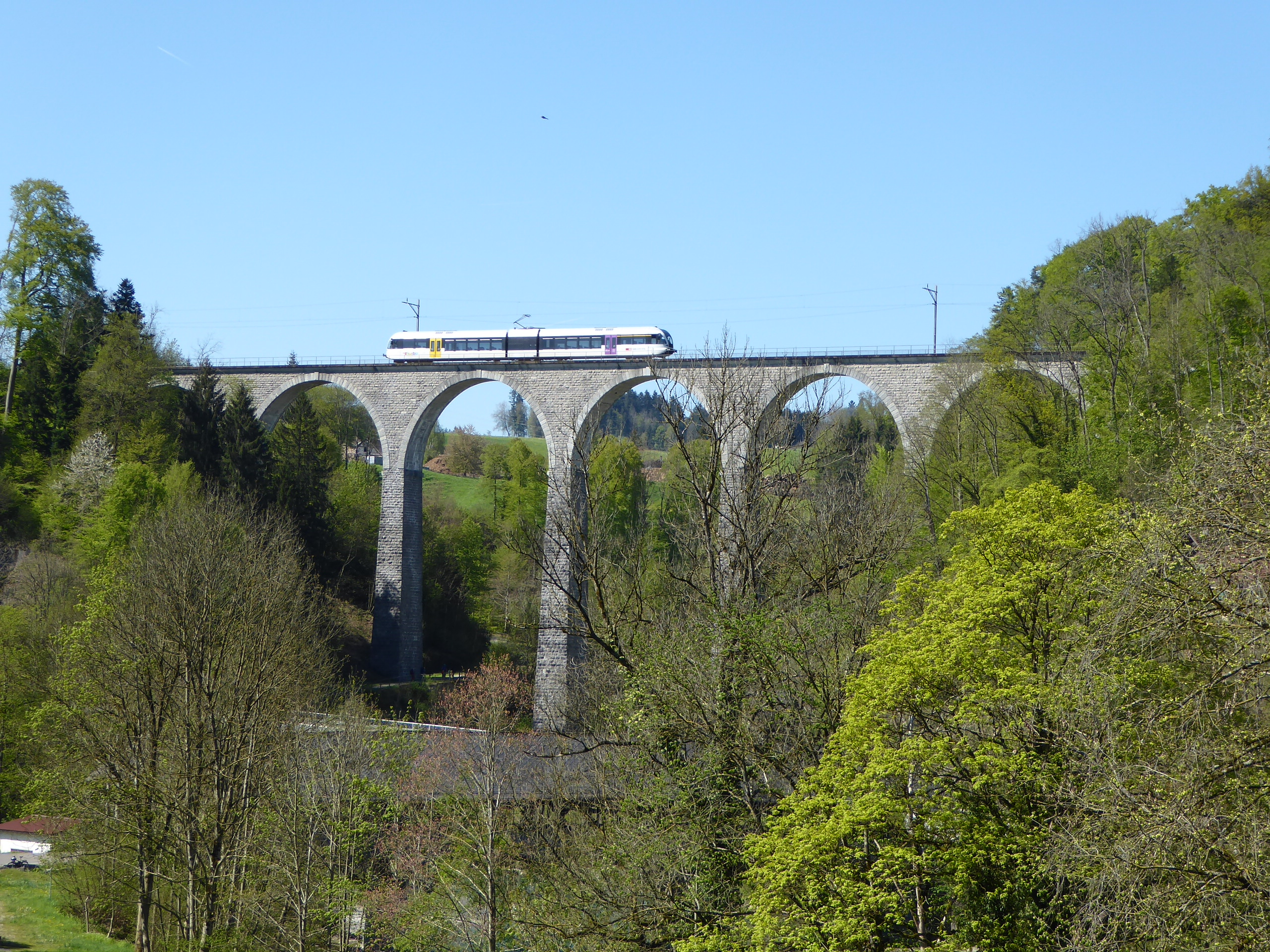 Guggenlochbrücke bei Lütisburg mit einem Turbo-GTW 2/6